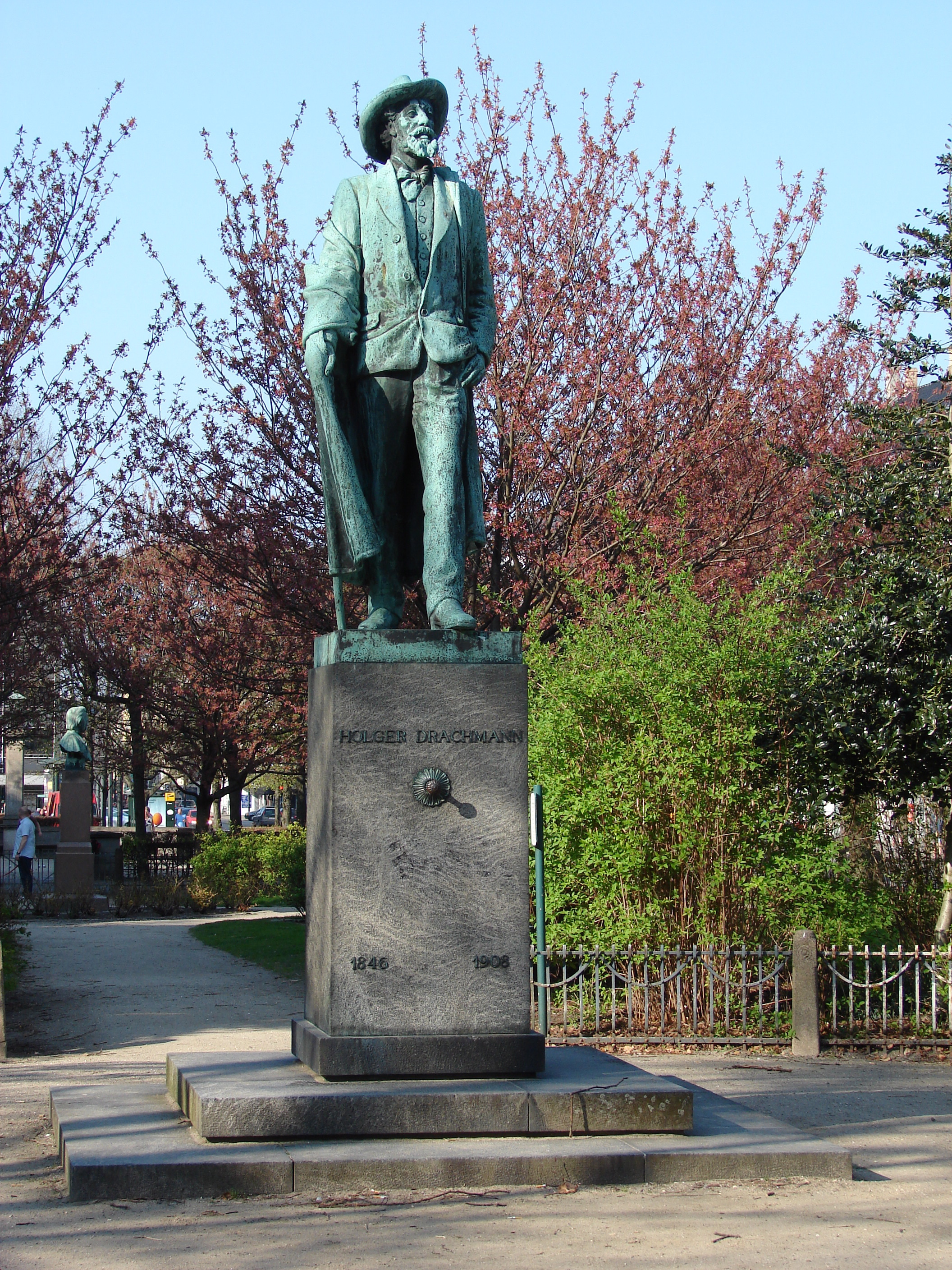 Holger Drachmann af Hans Christian Holter (1890-1922), Allégade, Frederiksberg, København, 1923